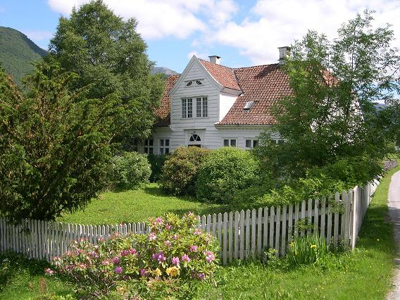 Bildet er tatt av Kapteinsgården juli 2009.